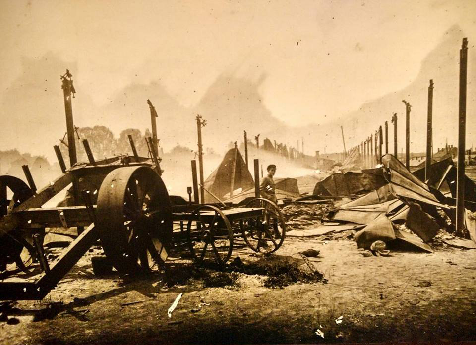 Беларуская (тарашкевіца): Менску (Miensk ), Добрыя Мысьлі (Dobryja Myśli). Берасьцейскі (Bieraściejski) вакзал